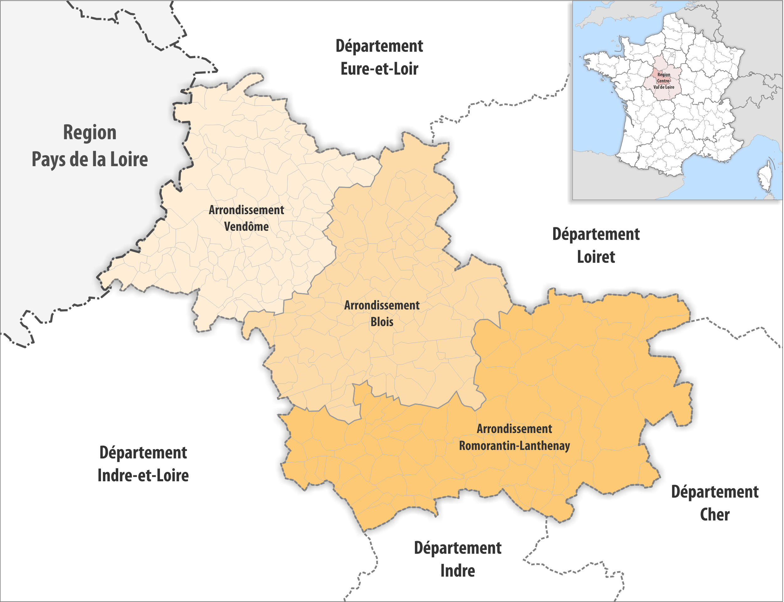 Gemeinden und Arrondissemente im Departement Loir-et-Cher